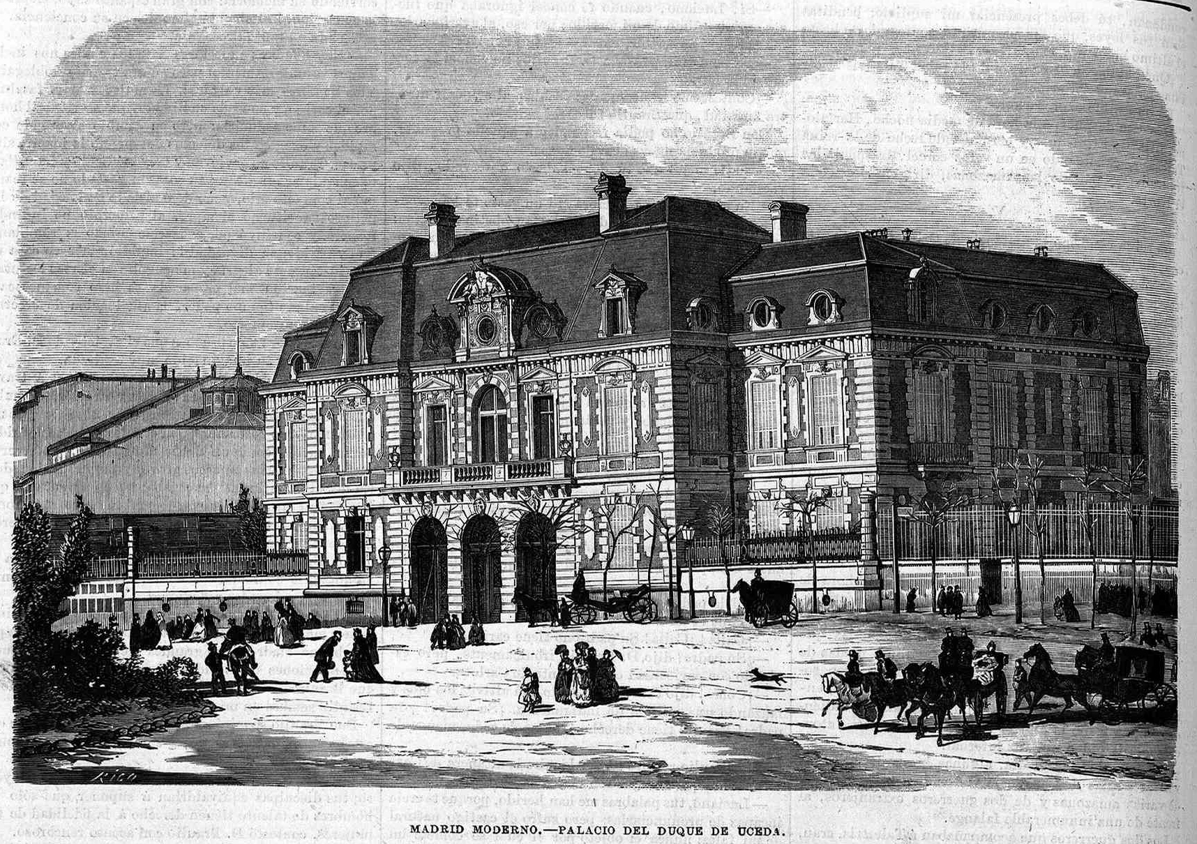 Palacio del Duque de Uceda, en la revista La Ilustración de Madrid.